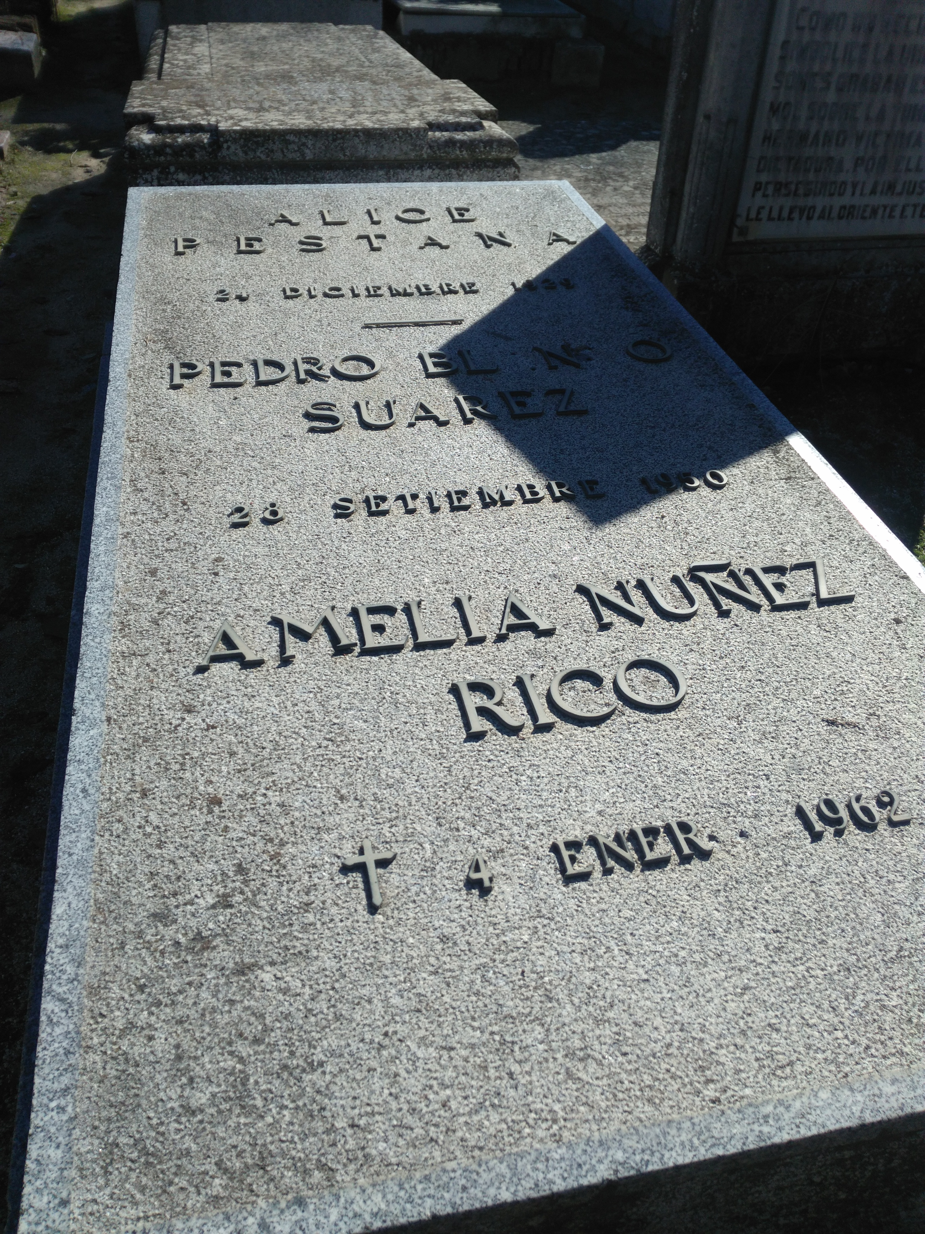 Tumba de Alice Pestana, Pedro Blanco Suárez y Amelia Núñez Rico. Cementerio civil de Madrid.